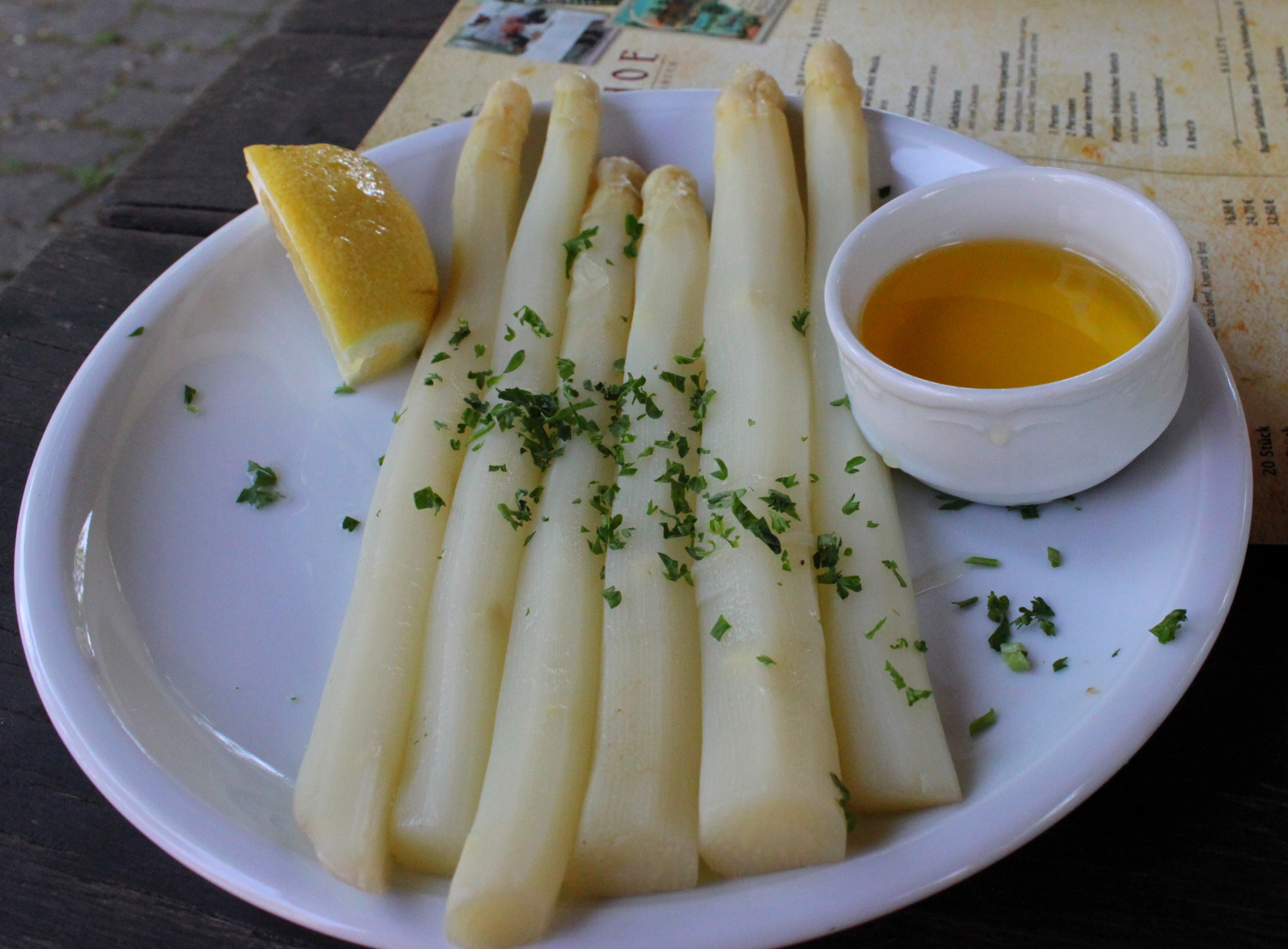 Spargel mit Butter und Zitrone. Dazu wurden grobe Bratwürste mit Kartoffeln gereicht. Fotografiert im Tucherhof in Nürnberg.